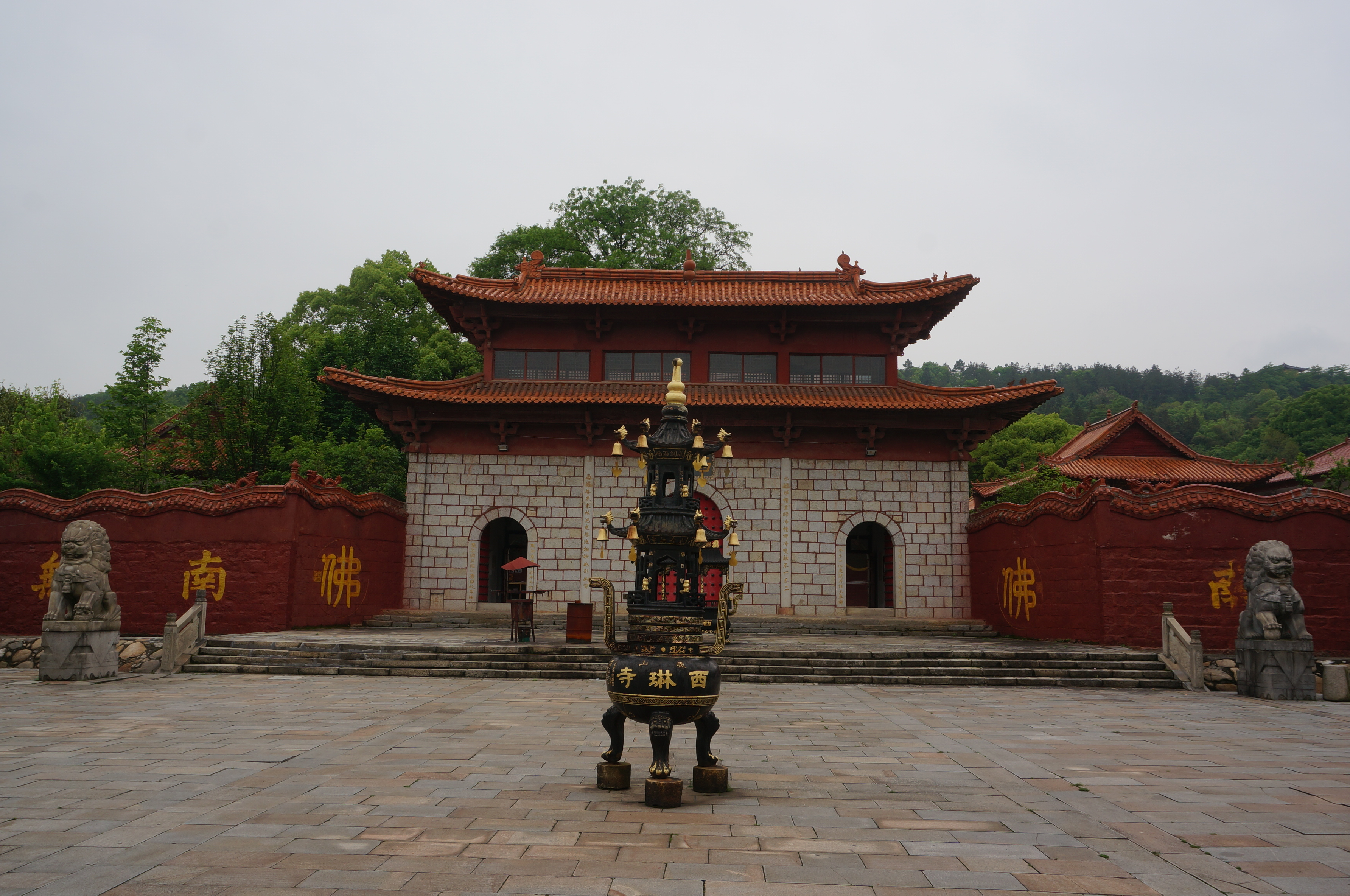 庐山西林寺，山门，南面。